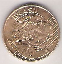 Verso da moeda de 25 centavos da segunda geração. This graphic was created with GIMP.